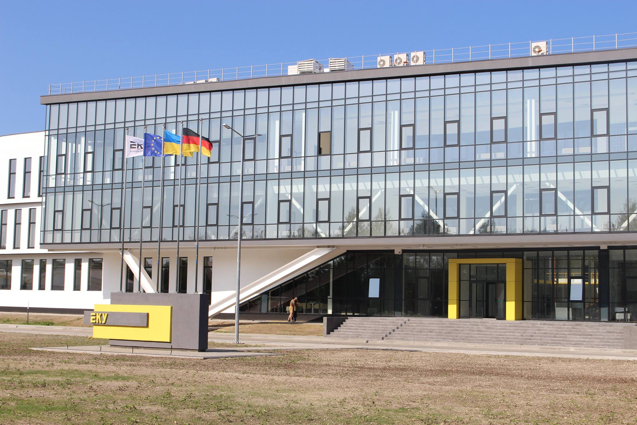 Дата фото - 2017 рік